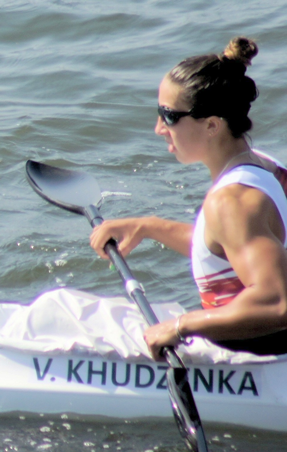 Rio 2016. Canoagem de velocidade/Canoe sprint